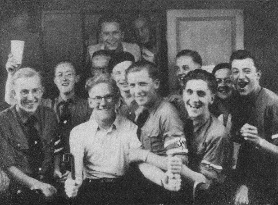 Fotografie der Kameradschaft "Albrecht der Bär" (Würzburg)